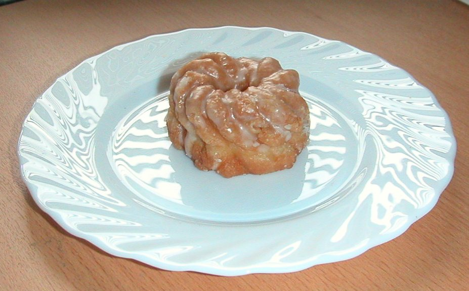 Mini-Spritzkuchen